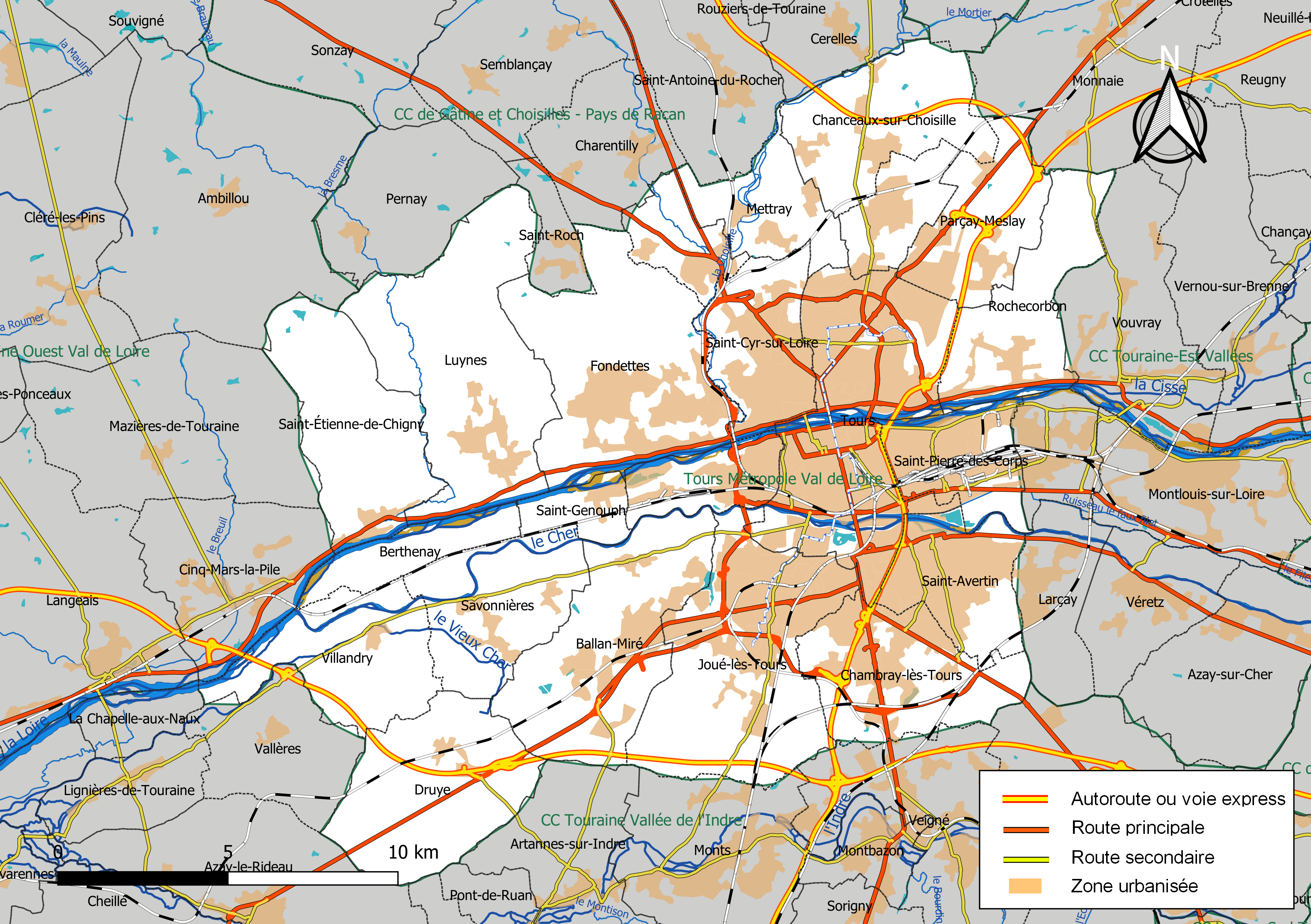 Carte de l'intercommunalité Tours Métropole Val de Loire, département d'Indre-et-Loire, France. Composition au 1er janvier 2019.